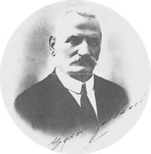 Ritratto di Egidio Galbani